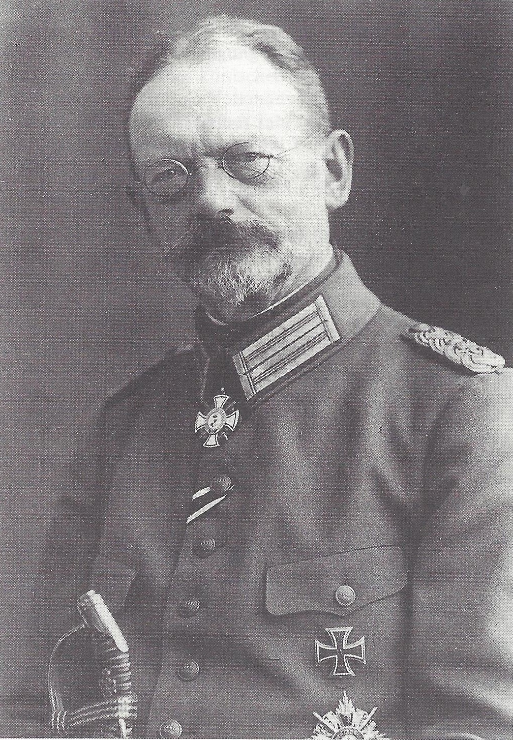 Porträtfotografie von Paul Kraske